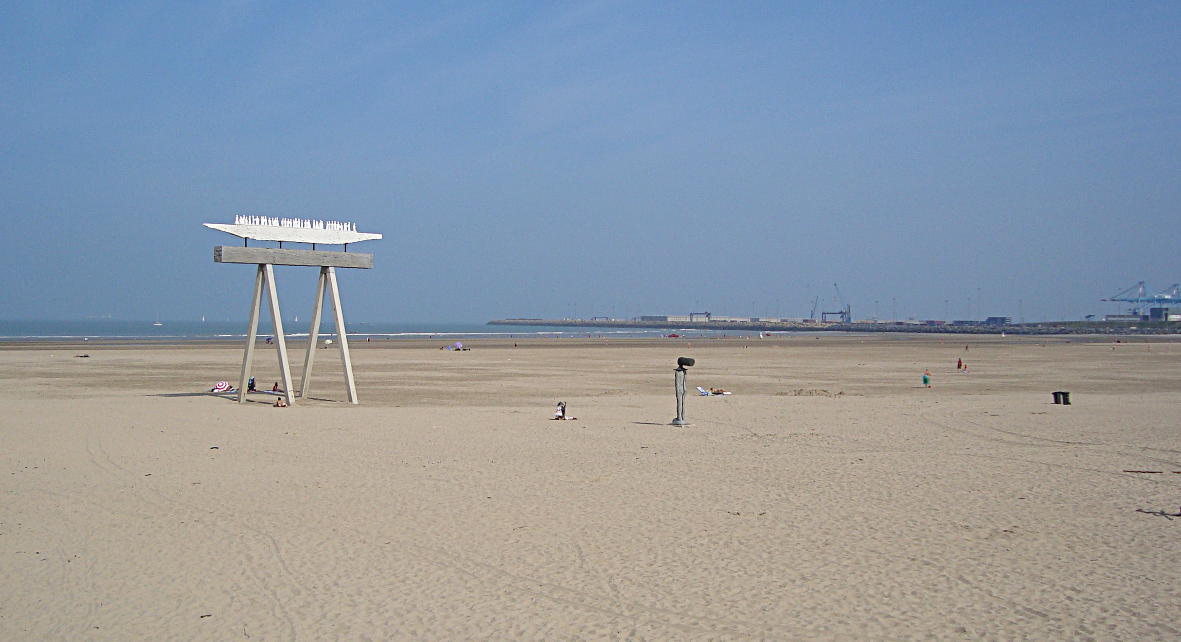 La plage de Zeebrugge (Belgique).